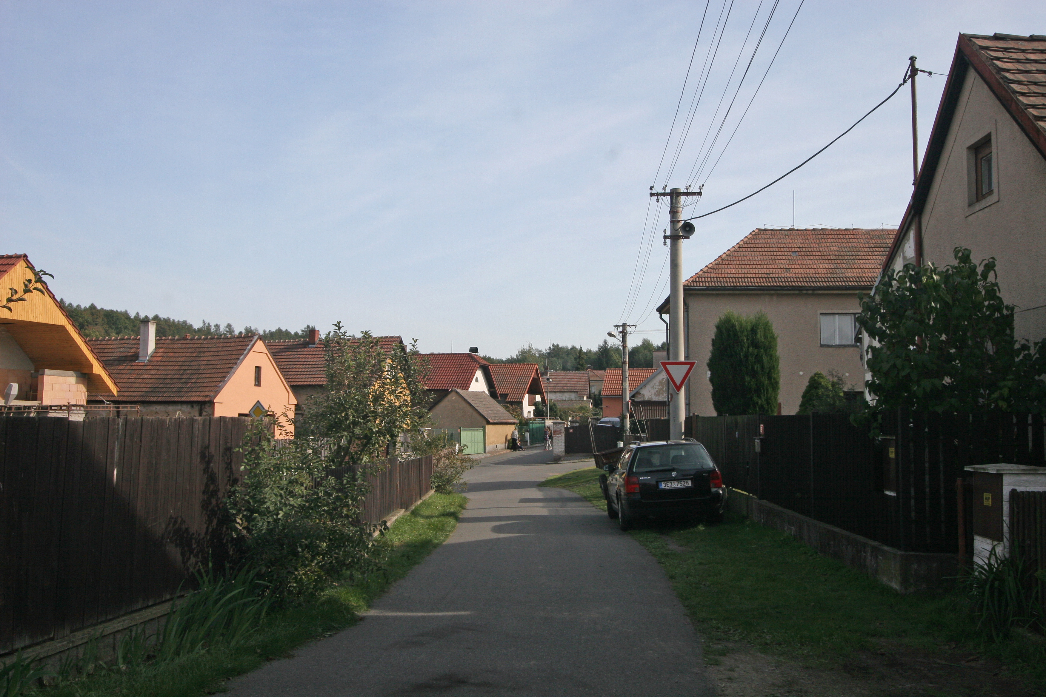 Morašice